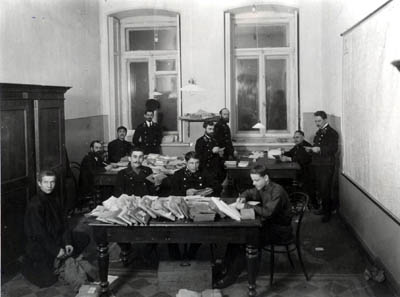 почтовая служба Азербайджана в 20-х гг ХХ века.